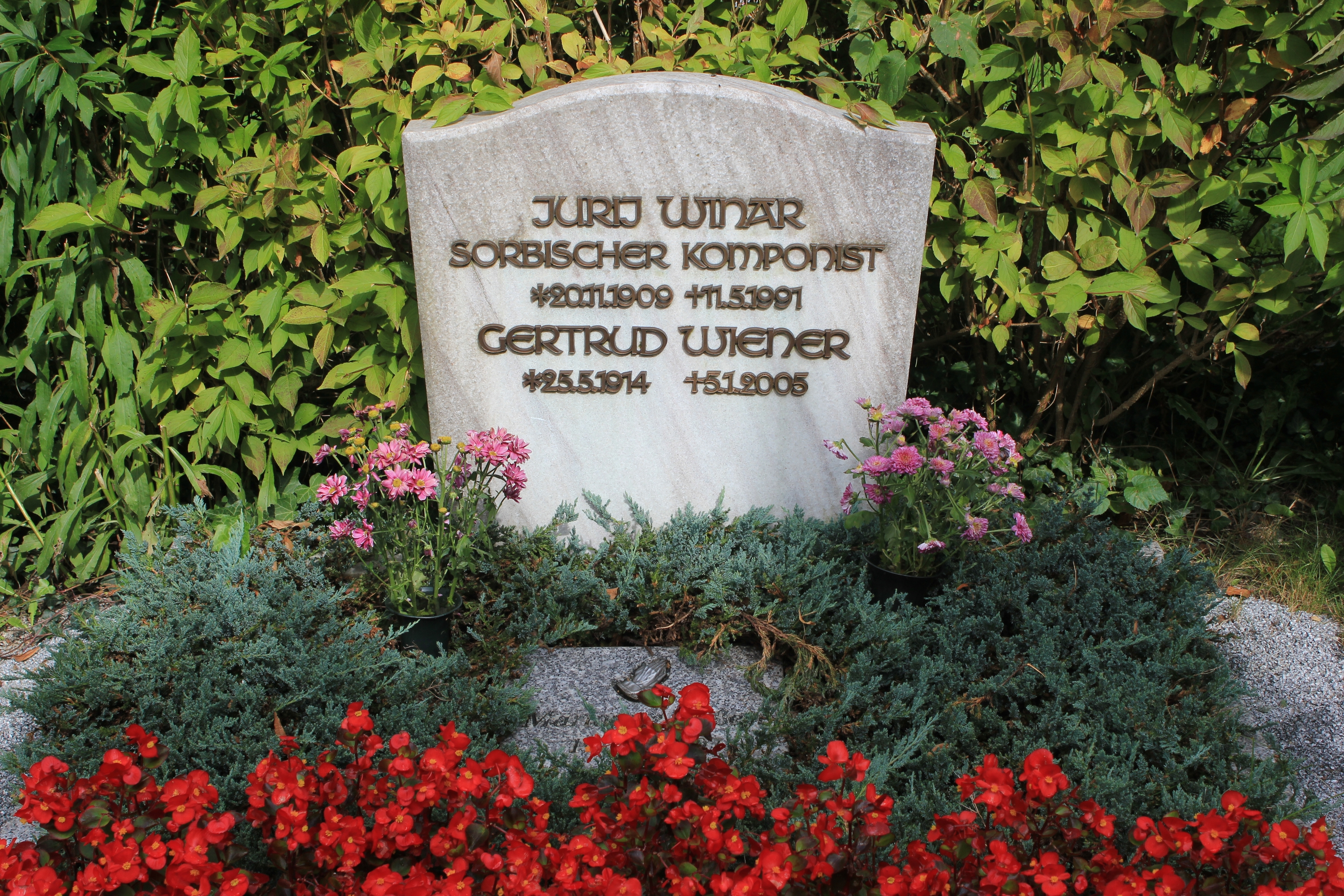 Hornjoserbsce: Row Jurja Winarja na Budyskim Hrodźišku.